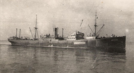 Die Speybank, das spätere deutsche Minenschiff Doggerbank